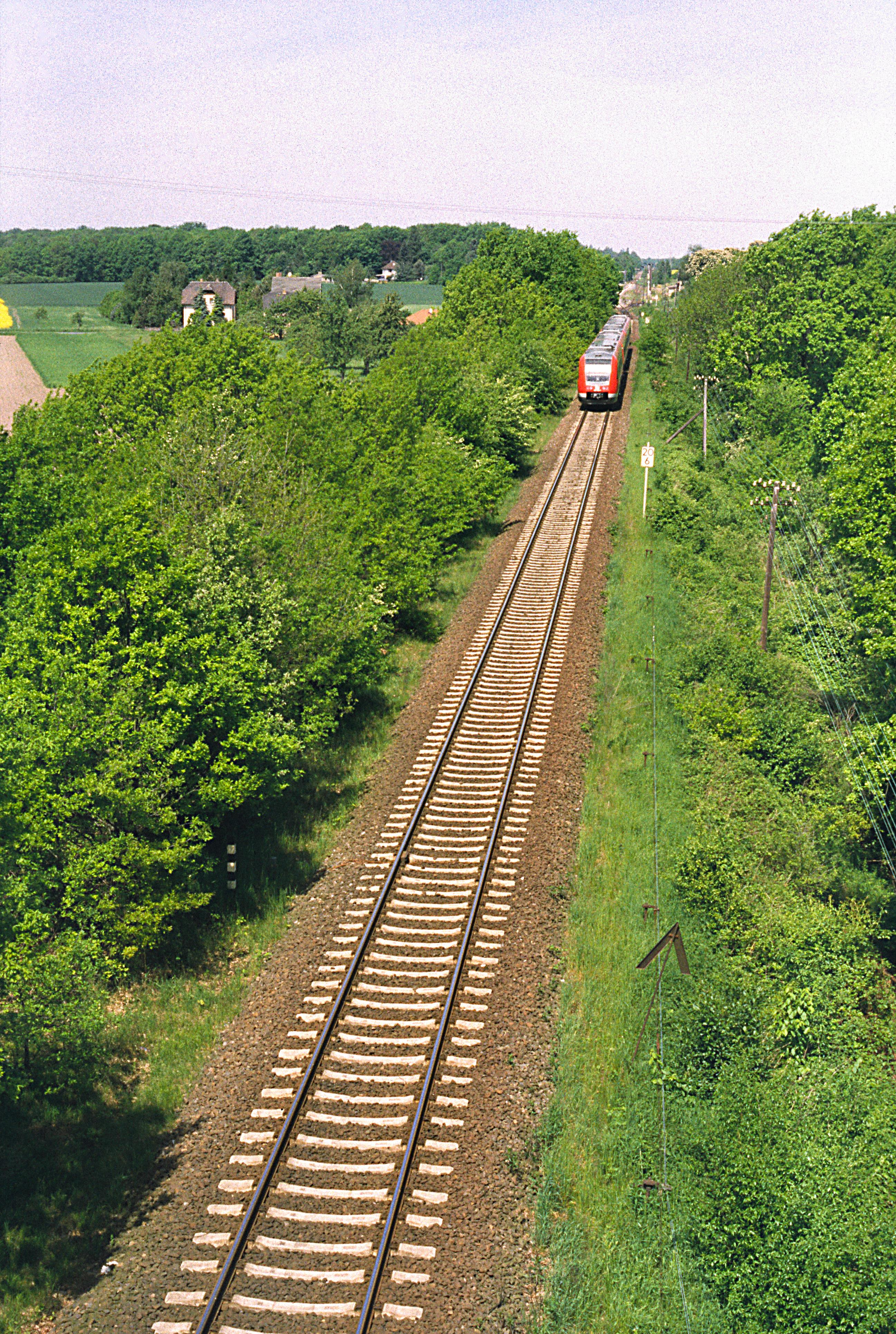 bei der Durchfahrt durch Belgershain, Kamerastandort ist das Einfahrsignal H (ein mechanischer zehn-Meter-Mast).